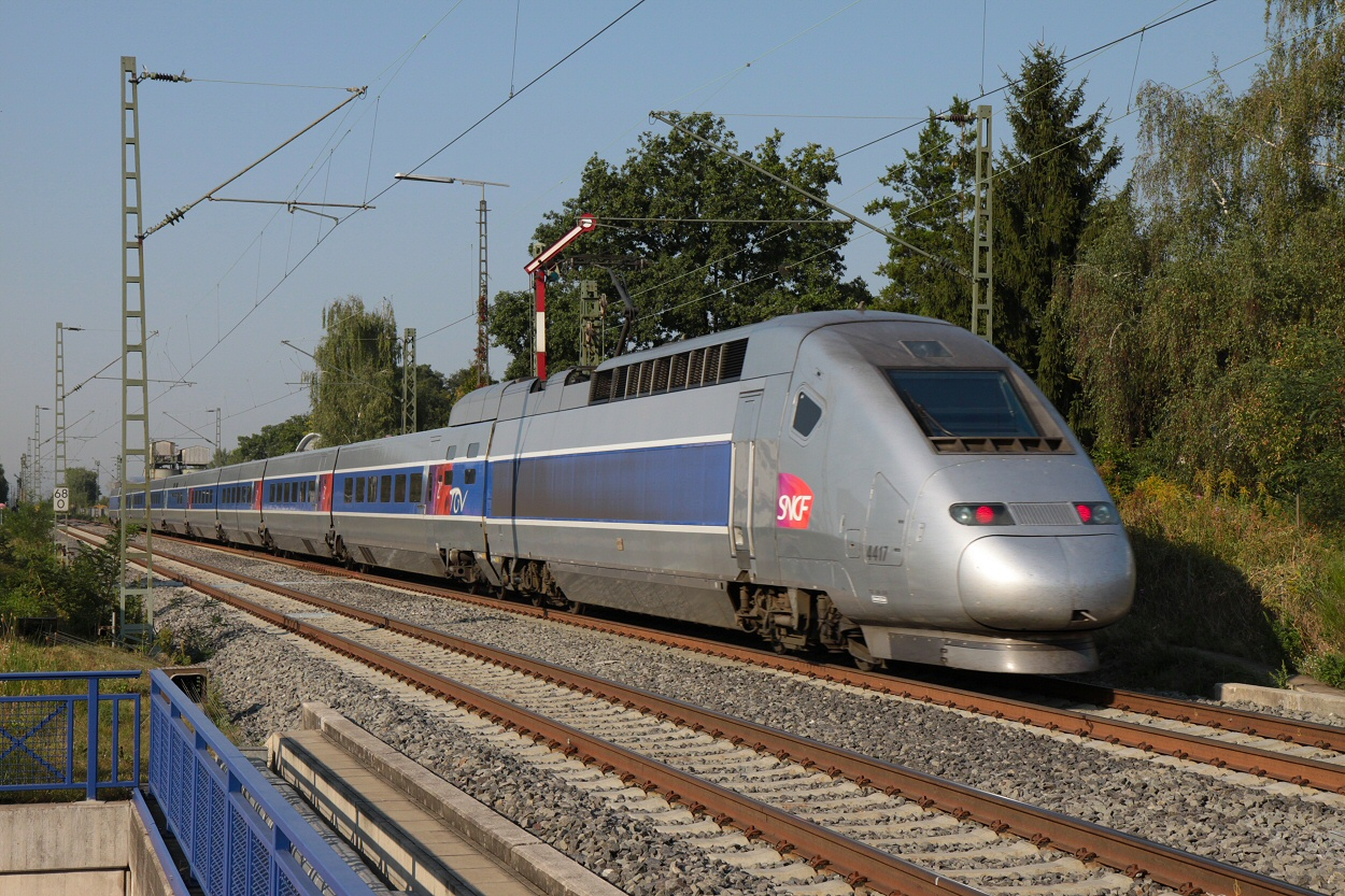 TGV POS Zuggarnitur 4417 als TGV 9576 bei der Durchfahrt des Bahnhof Forchheim in Richtung Rastatt